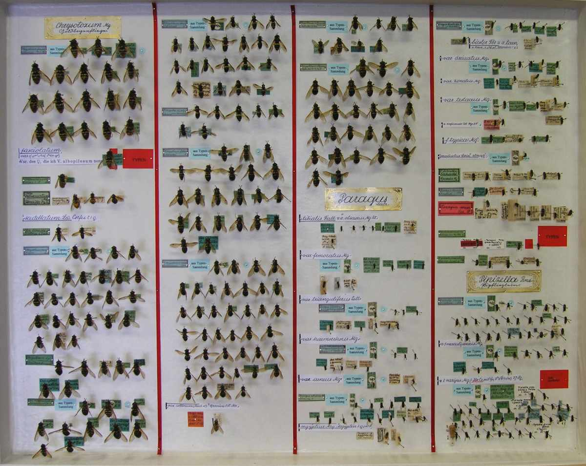 Die Dipteren-Sammlung von Pater Gabriel Strobl (1846-1925) im Naturhistorischen Museum des Benediktinerstiftes Admont (Stmk., Österreich) zählt mit ihren etwa 80.000 aufbewahrten Exemplaren und ca. 7.500 verschiedenen Artnamen zu den drei bedeutendsten Fliegen-Kollektionen in Europa